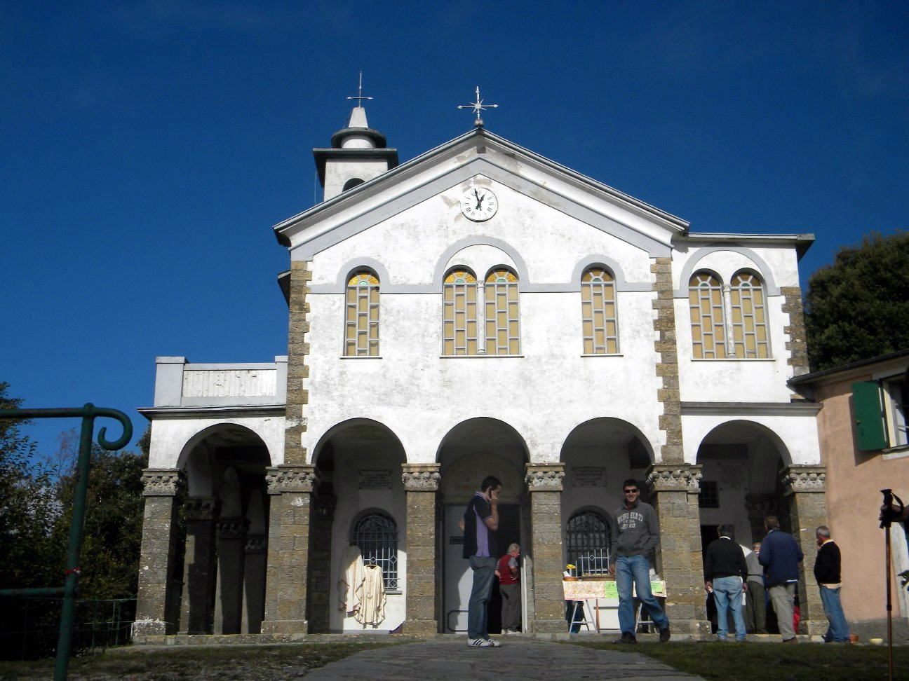 Facciata del santuario della Madonna di Caravaggio, Rapallo, Liguria, Italia